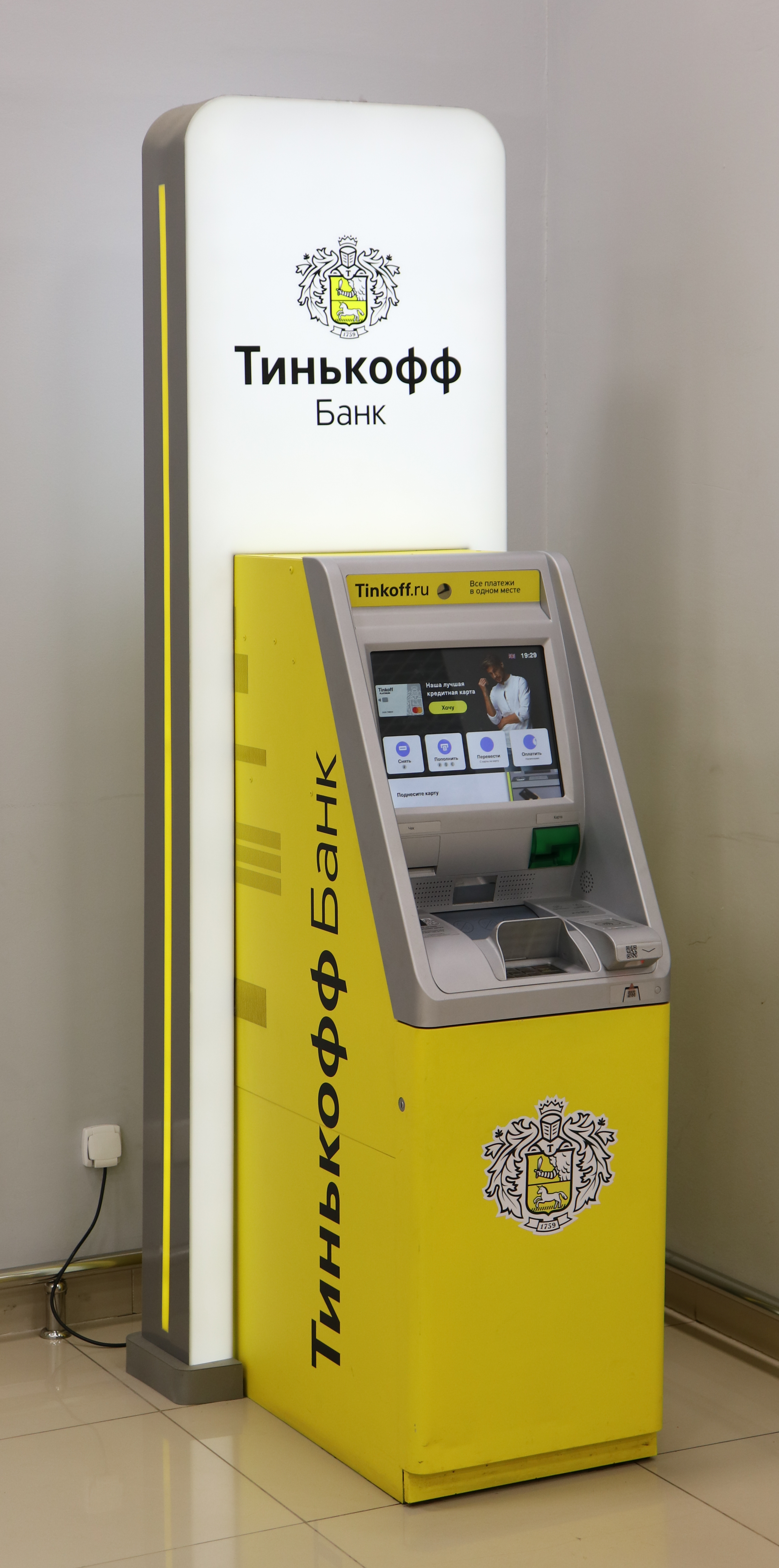 Банкомат Тинькофф банка в Москве